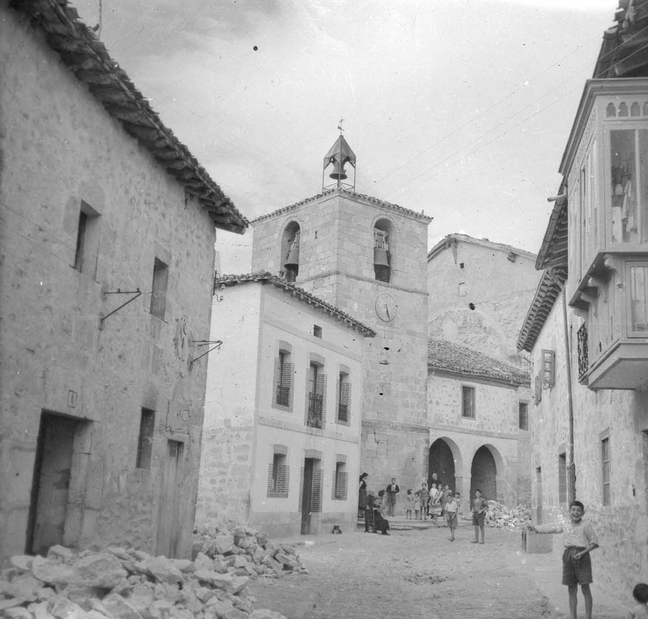 Zambranako elizaren ikuspegia 1956. urtean.